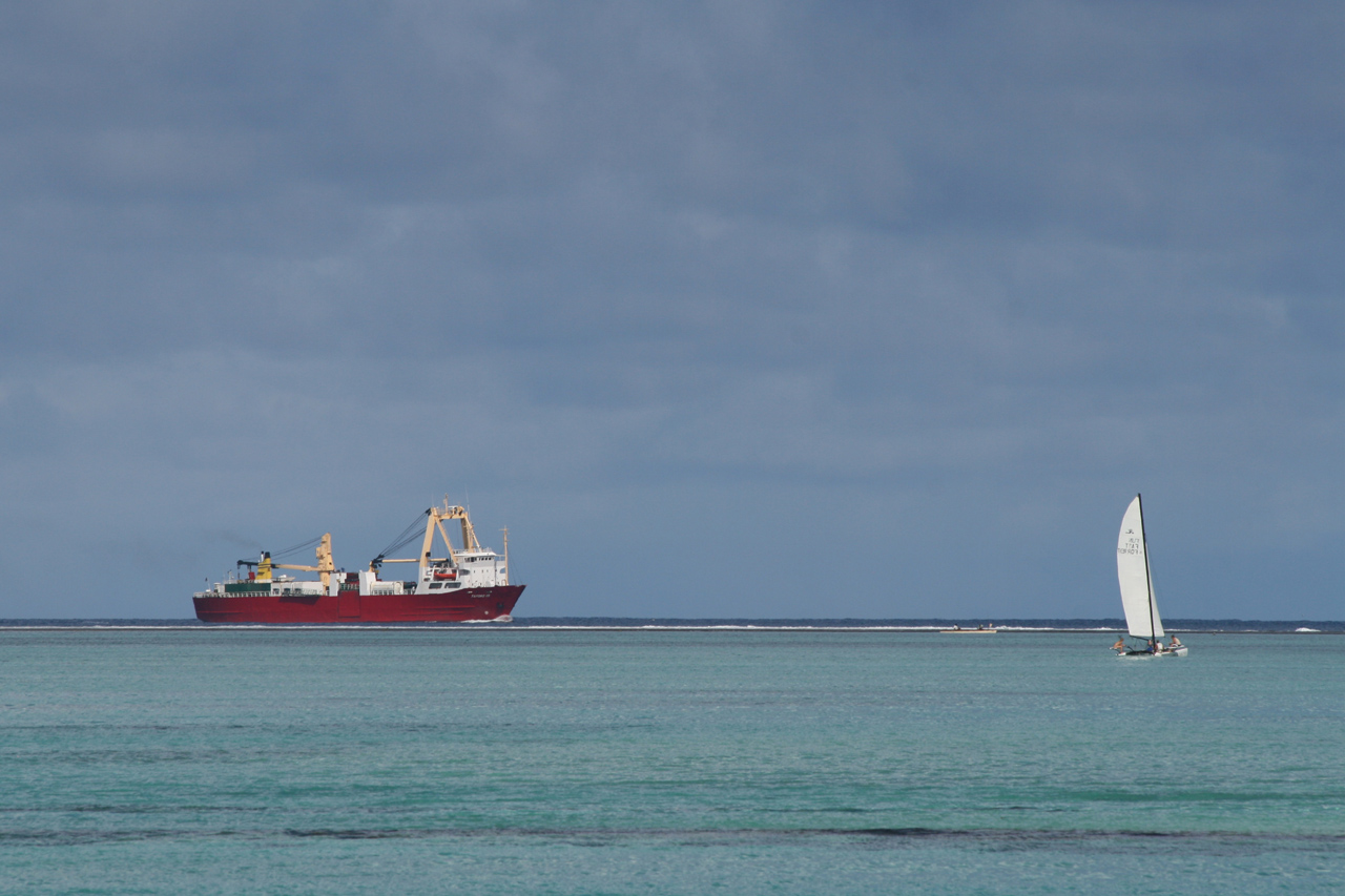 Taporo VII exploité par la Compagnie française maritime de Tahiti (C.F.M.T.).